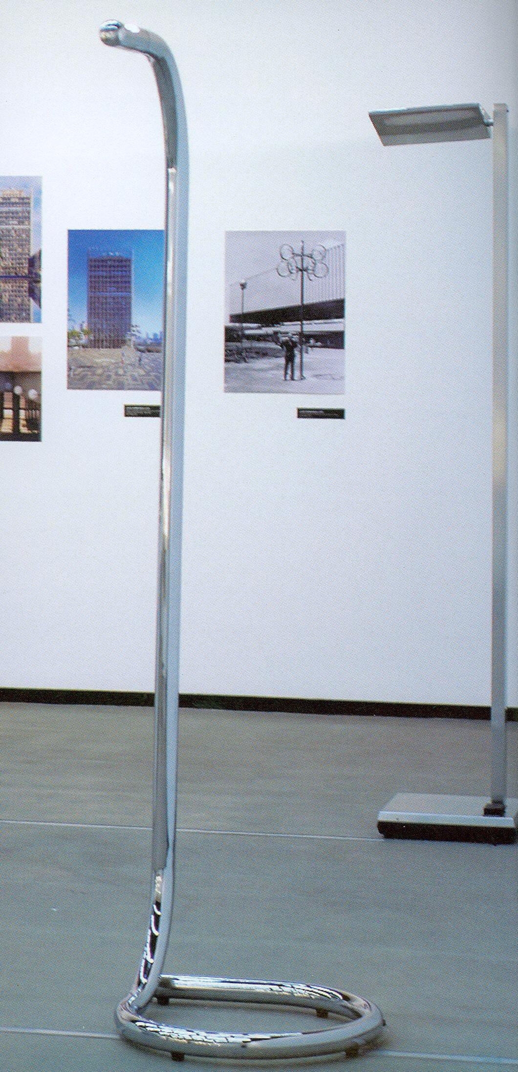 Aparelho de iluminaçao de interiores, autoria de Lîvio Levi